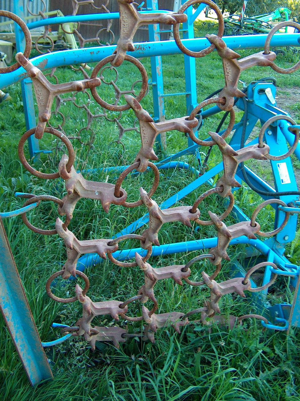 Saphir-Wiesenegge, zusammengeklappt